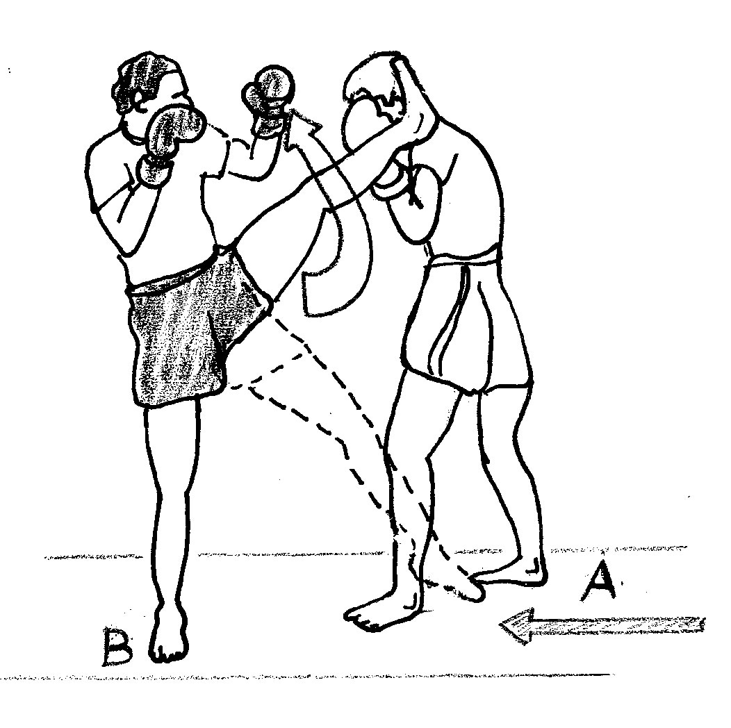 crescent1.jpg